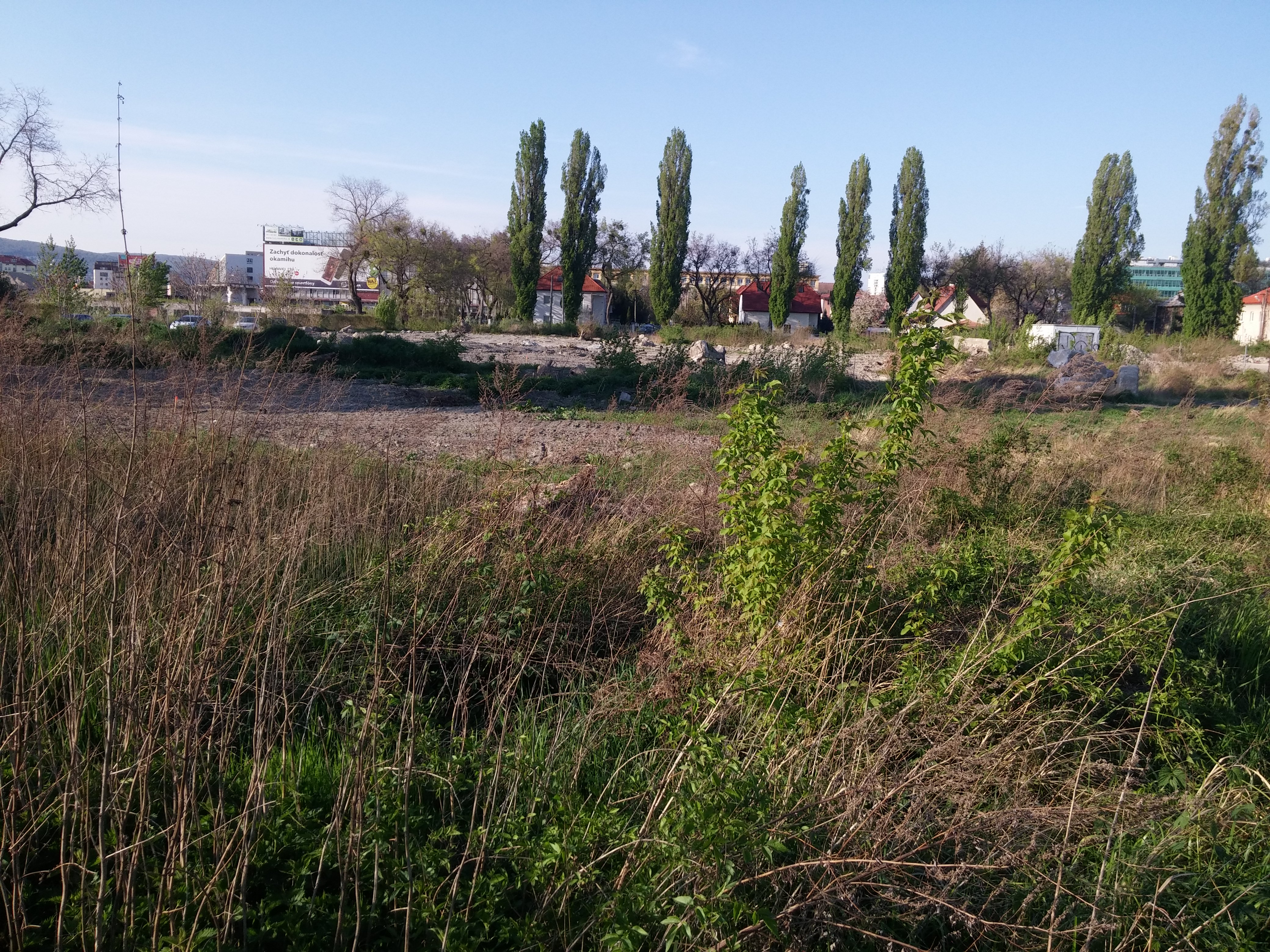 Klingerka, Ružinov, Bratislava